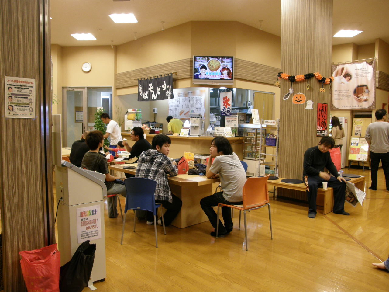 オータム天然温泉しあわせの湯Ⅱ 田上 撮影：松岡明芳